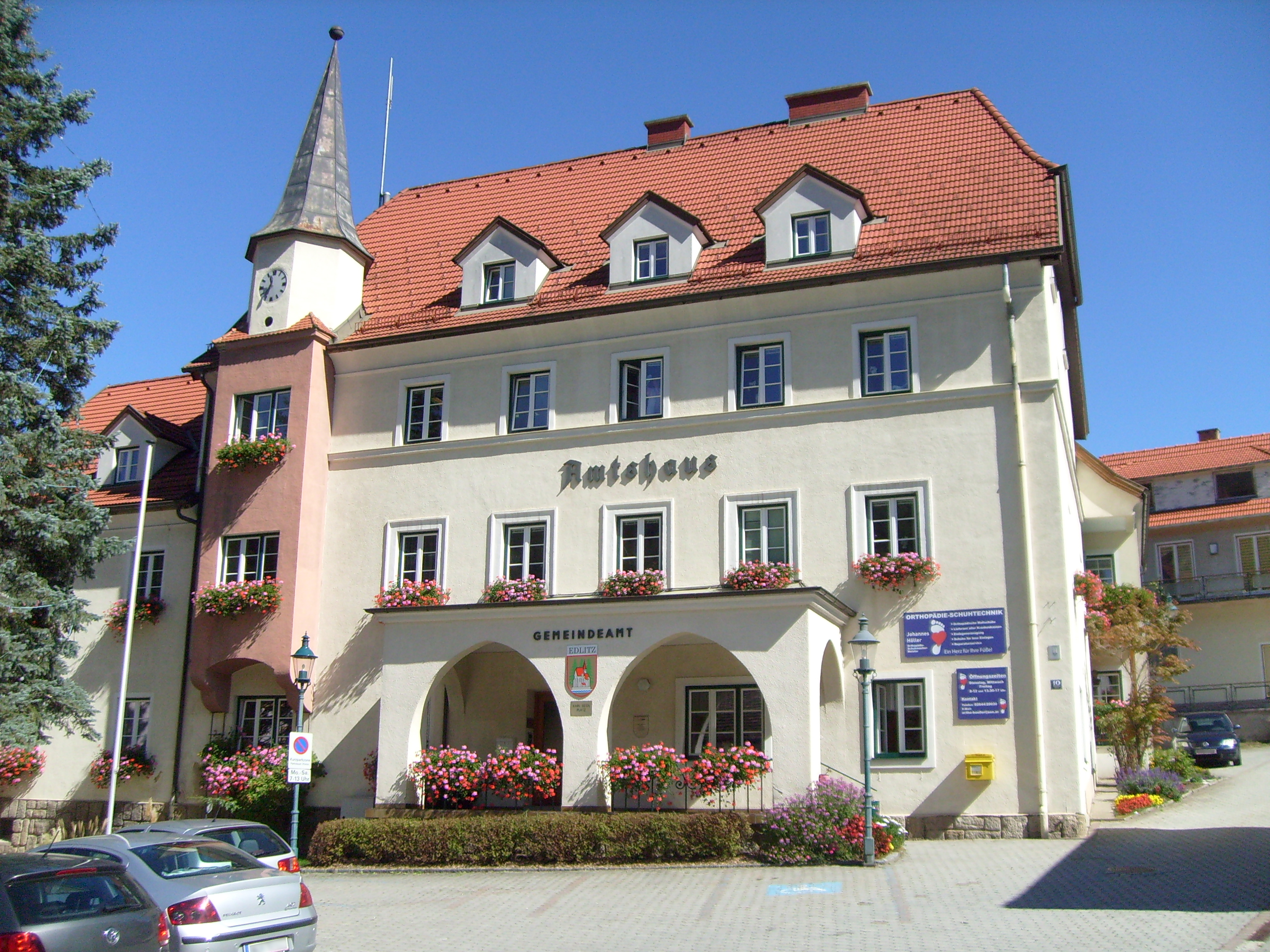 Amtsgebäude in Edlitz